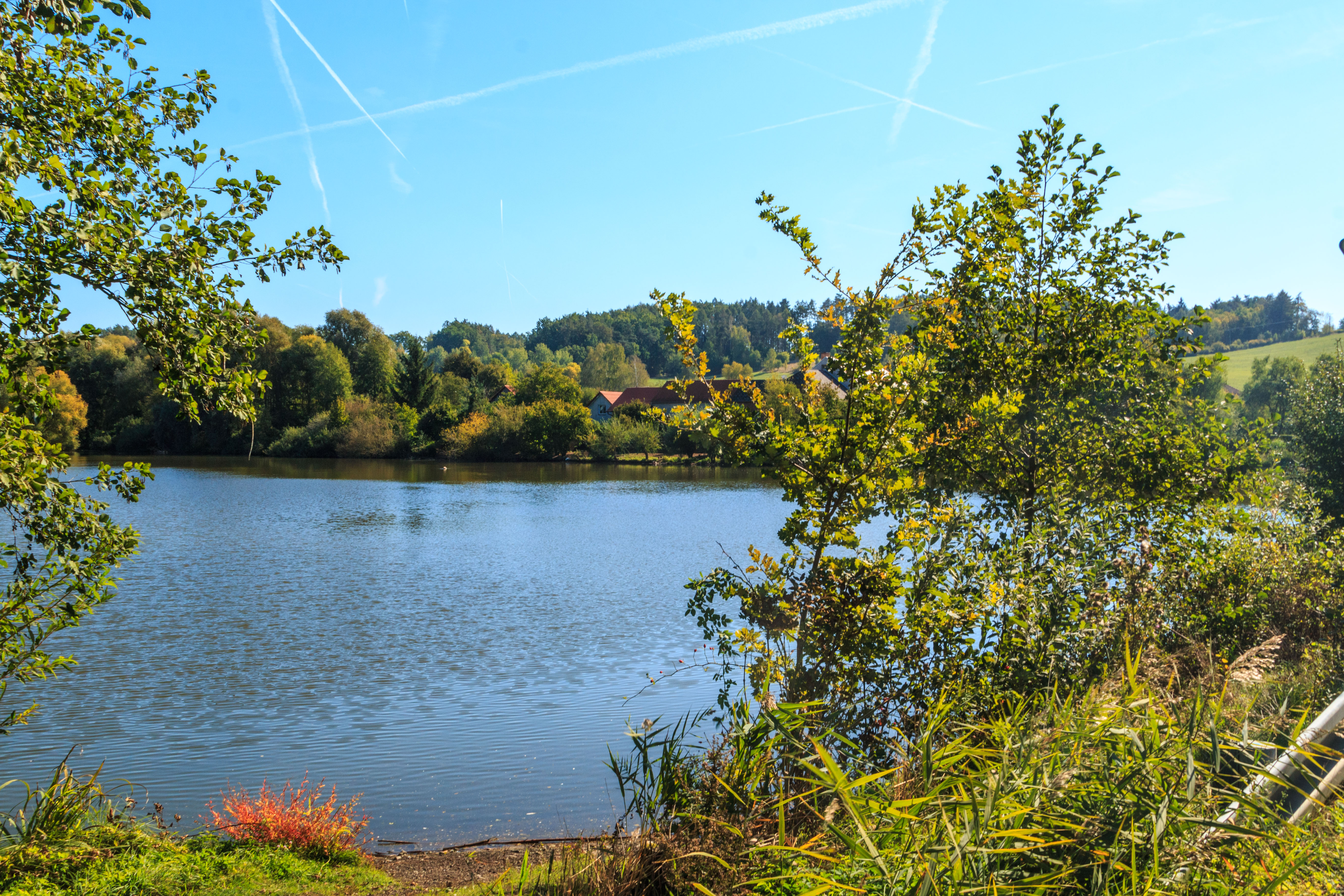 Rybník Patřín u Kněžmostu Project: Vodstvo.